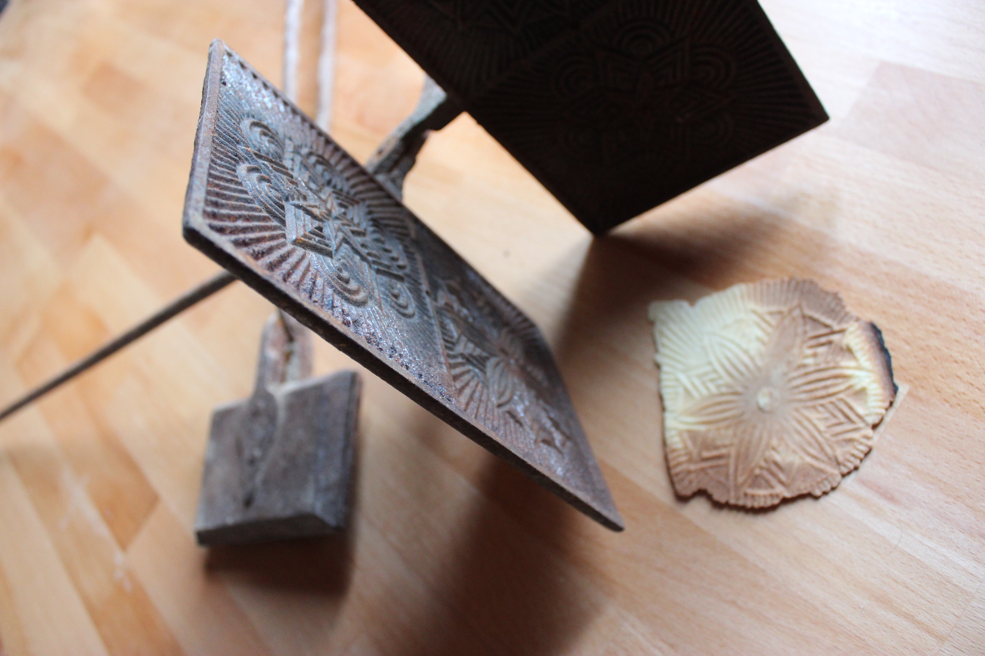 Deux vieux moules à cène et une cène moulée